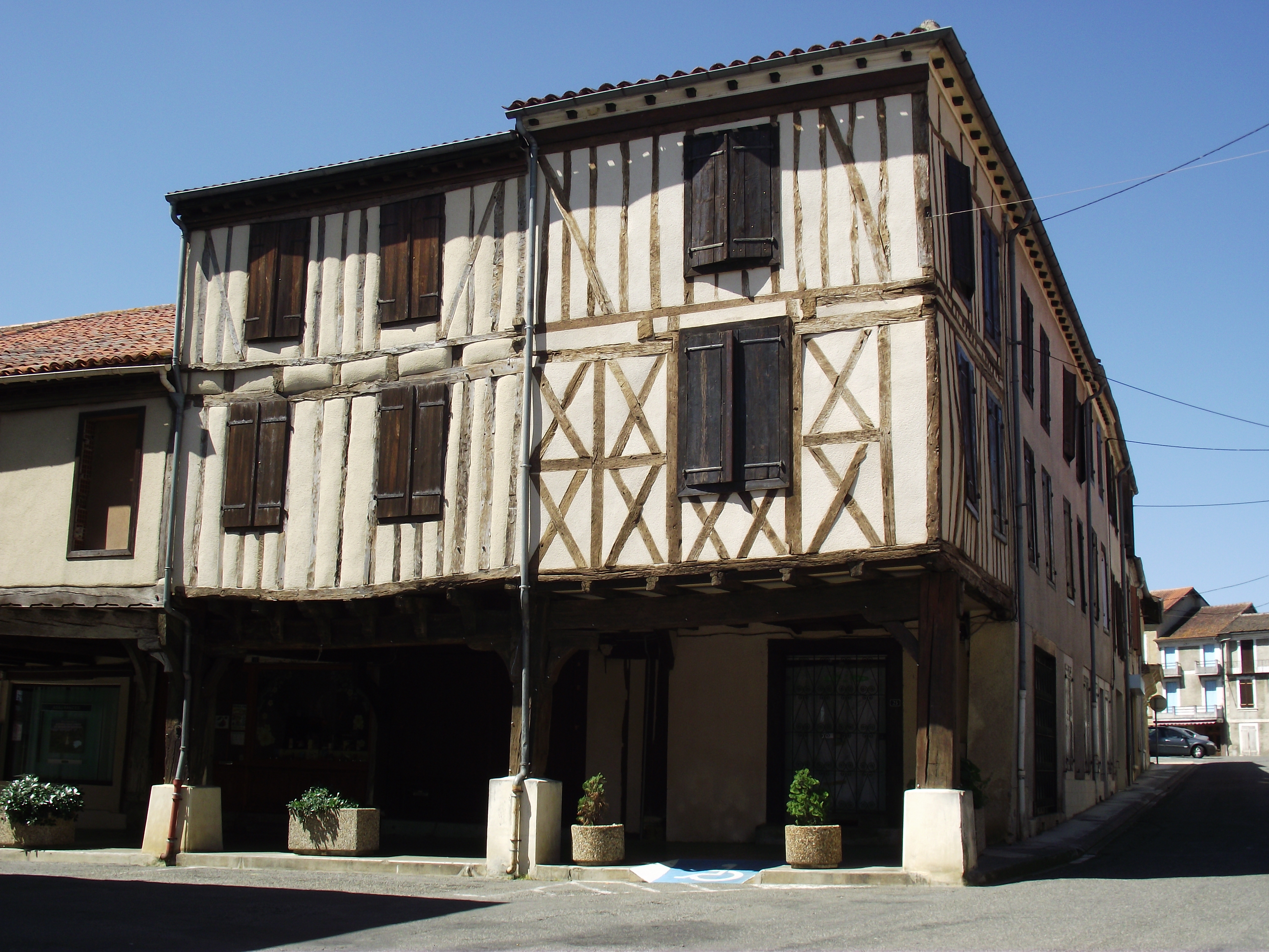 Maisons à colombages à l'angle Nord-Ouest de la place Jean Sénac (Miélan, Gers, France)